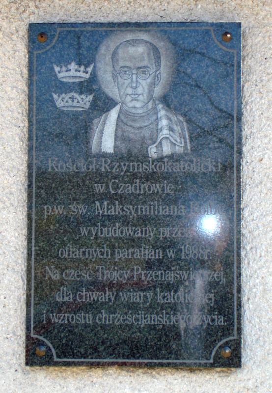 Kościół filialny pw. św. Maksymiliana Kolbe w Czadrowie (Dolny Śląsk, powiat kamiennogórski)